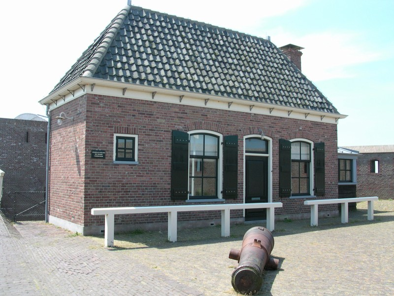 Gebouw op Fort Kijkduin in Huisduinen Bilding on Fort Kijkduin in Huisduinen